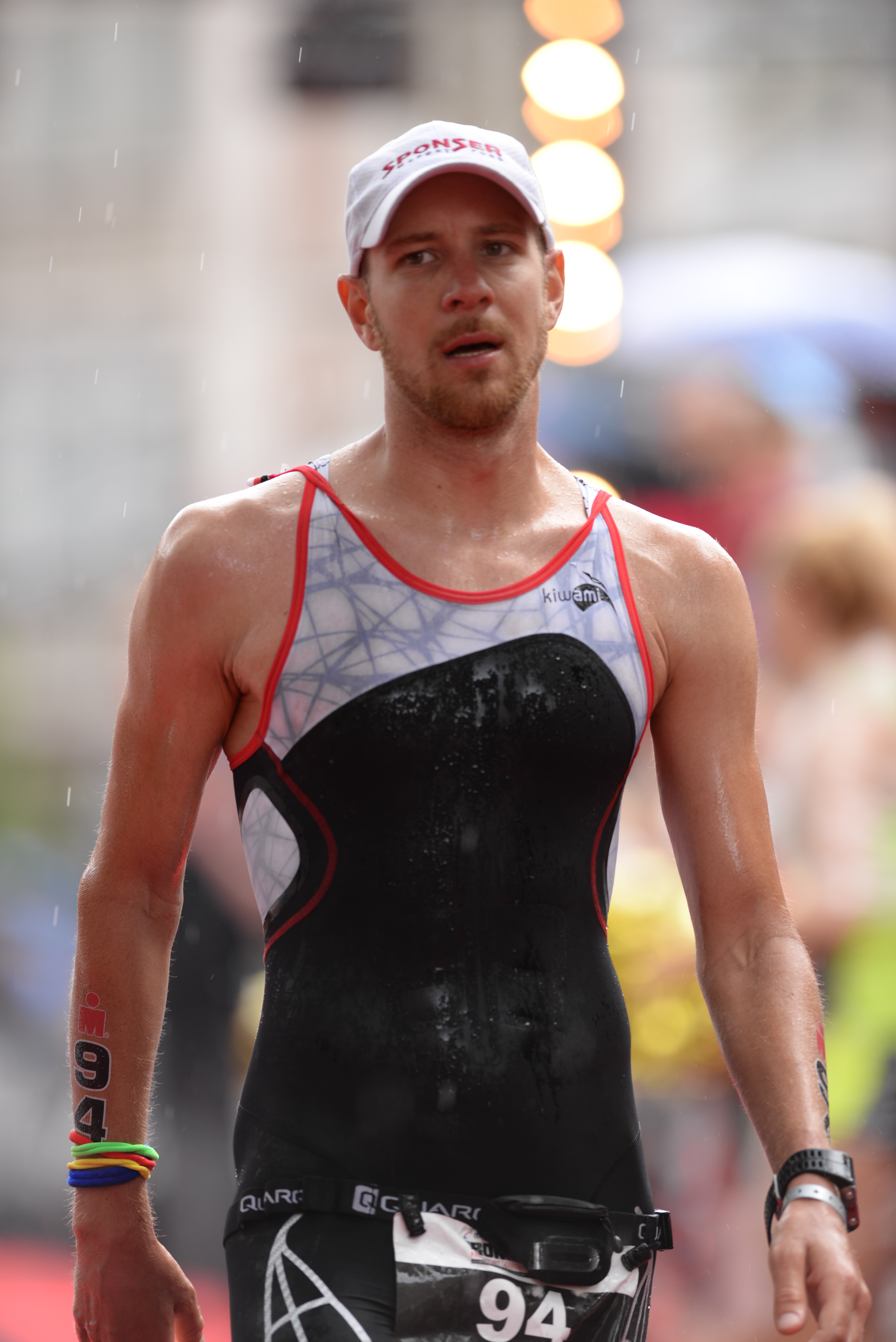 Ironman 2016, Starterlisten unter